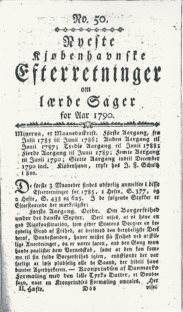 Nyeste kiøbenhavnske Efterretninger om lærde Sager, nr. 50 for året 1790. Tidsskriftet Minerva anmeldes.